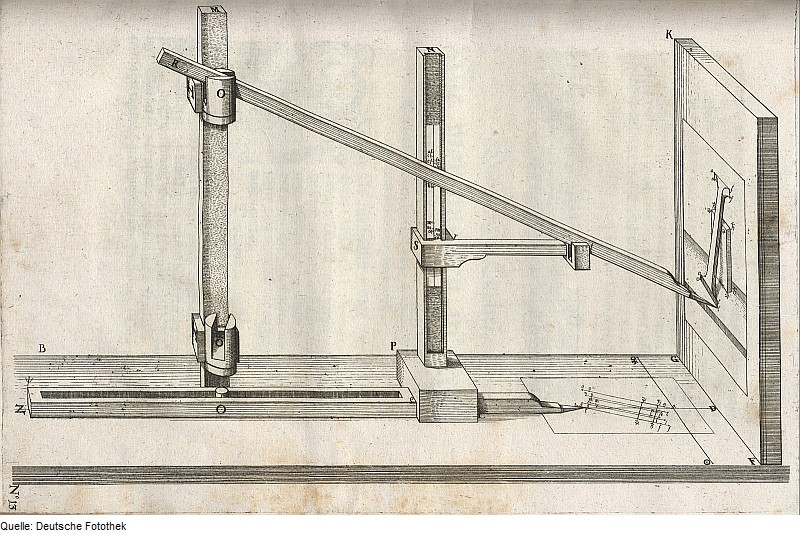 Original image description from the Deutsche Fotothek Geometrie & Perspektive & Instrument